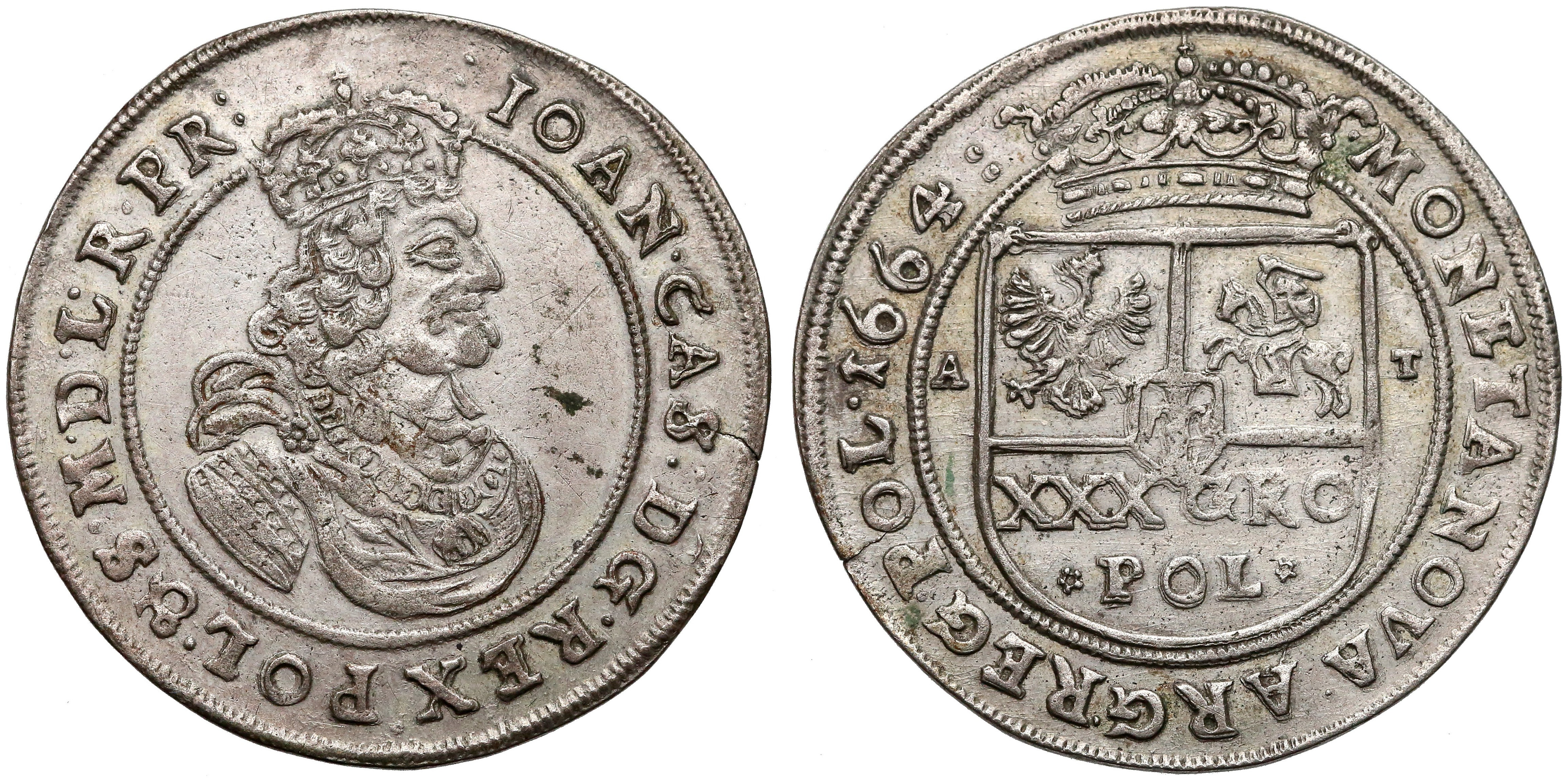 Tymf koronny 1664 portretowy